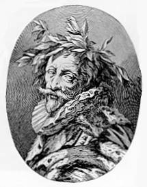 Giambattista Marino, poète italien (XVII s.)